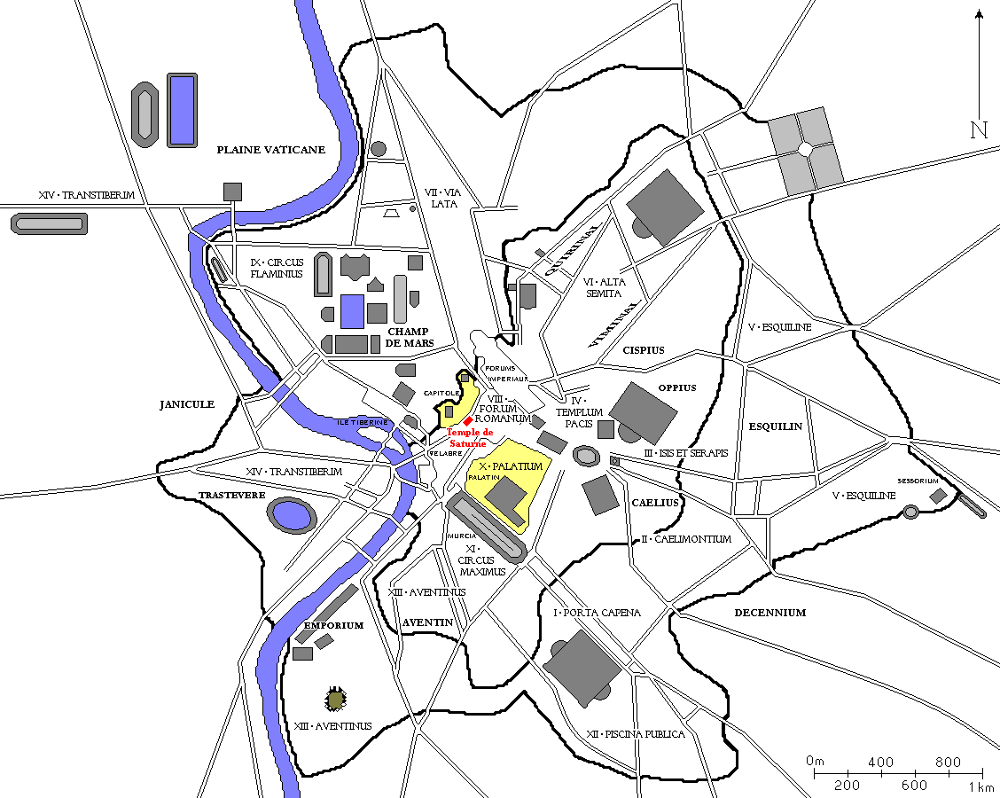 Plan de Rome redessiné à partir de diverses sources. Tous les bâtiments importants construits jusqu'à la fin de l'Empire romain sont dessinés, ainsi que les régions d'Auguste et les collines de Rome.